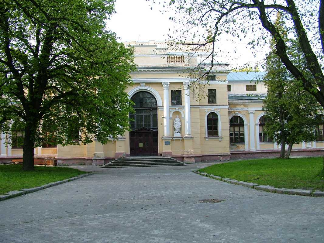 Lwów. Park Stryjski. Pałac Sztuki. Stan z maja 2005. Autor: Stanisław Kosiedowski.